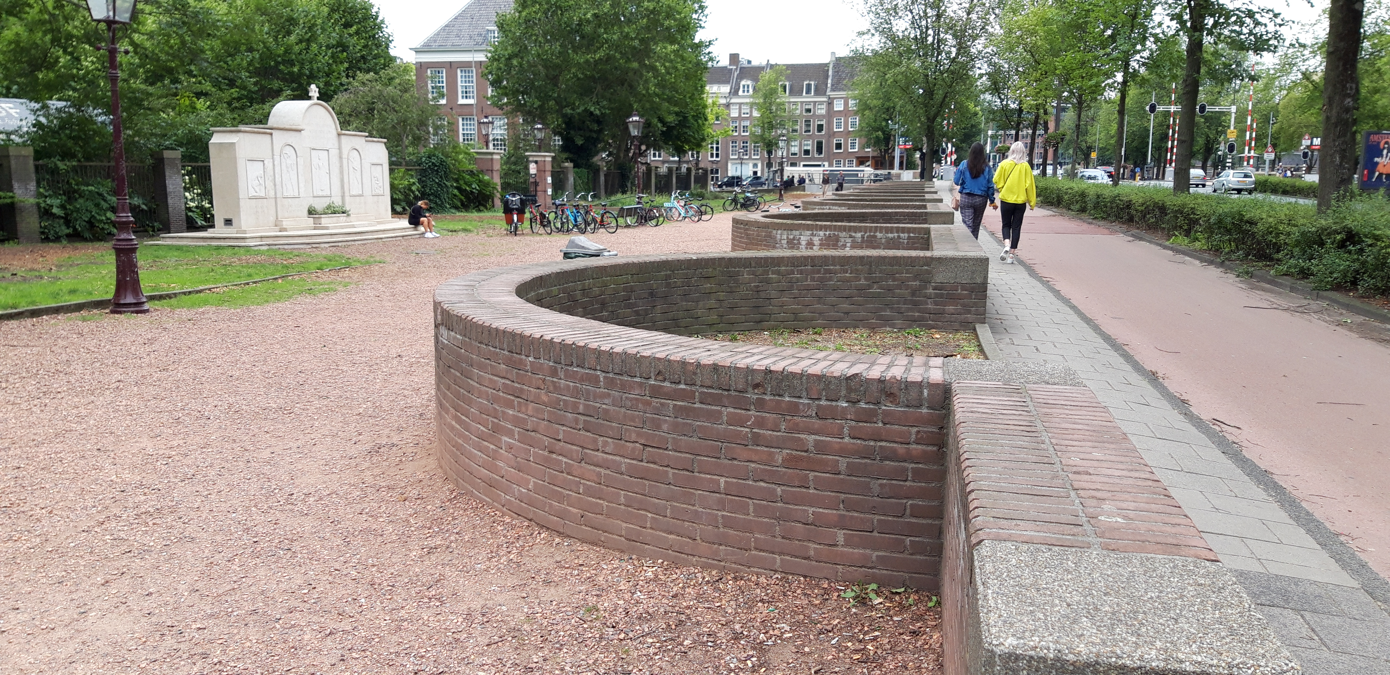 Weesperplantsoen met links het denkbaarheidsmonument in 2019. Locatie van het nog te bouwen Holocaust namenmonument.